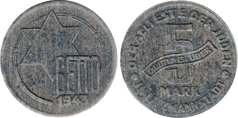 5 marek 1943 magnez Getto Łódź